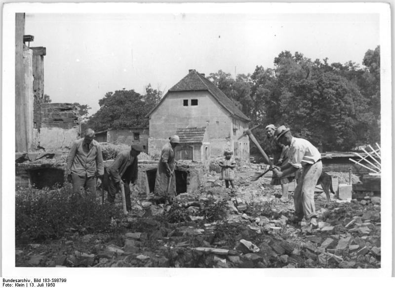 Uckro, Abriss eines Gutshofes Leben und Arbeit der Umsiedler im Land Brandenburg. Überall ist man dabei, alte Schlösser und Junkerburgen abzutragen, um aus dem Abbruch zusätzliches Material für das Neubauern-Bauprogramm zu gewinnen, und zum anderen die Erinnerung an jene Zeit zu erlöschen, in der es nur Herren und Knechte gab. Neben Abrisskolonnen finden sich Um- und Neusiedler ein, um in freiwilligen Arbeitseinsatz die Arbeiten zu beschleunigen. UBz: Der ehem. Gutshof in Uckro Kreis Luckau.